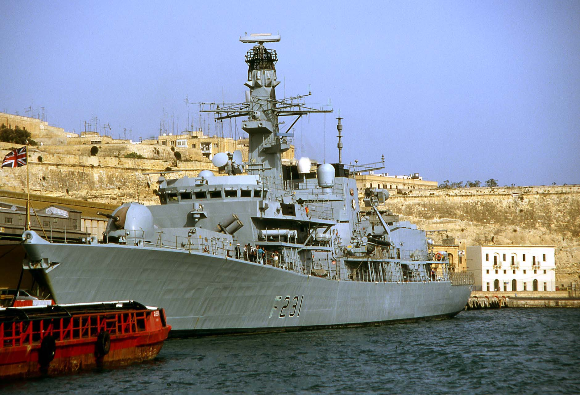 HMS Argyll (F231) at Valletta in 2002.